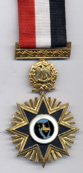 صورة وسام نجمة سيناء